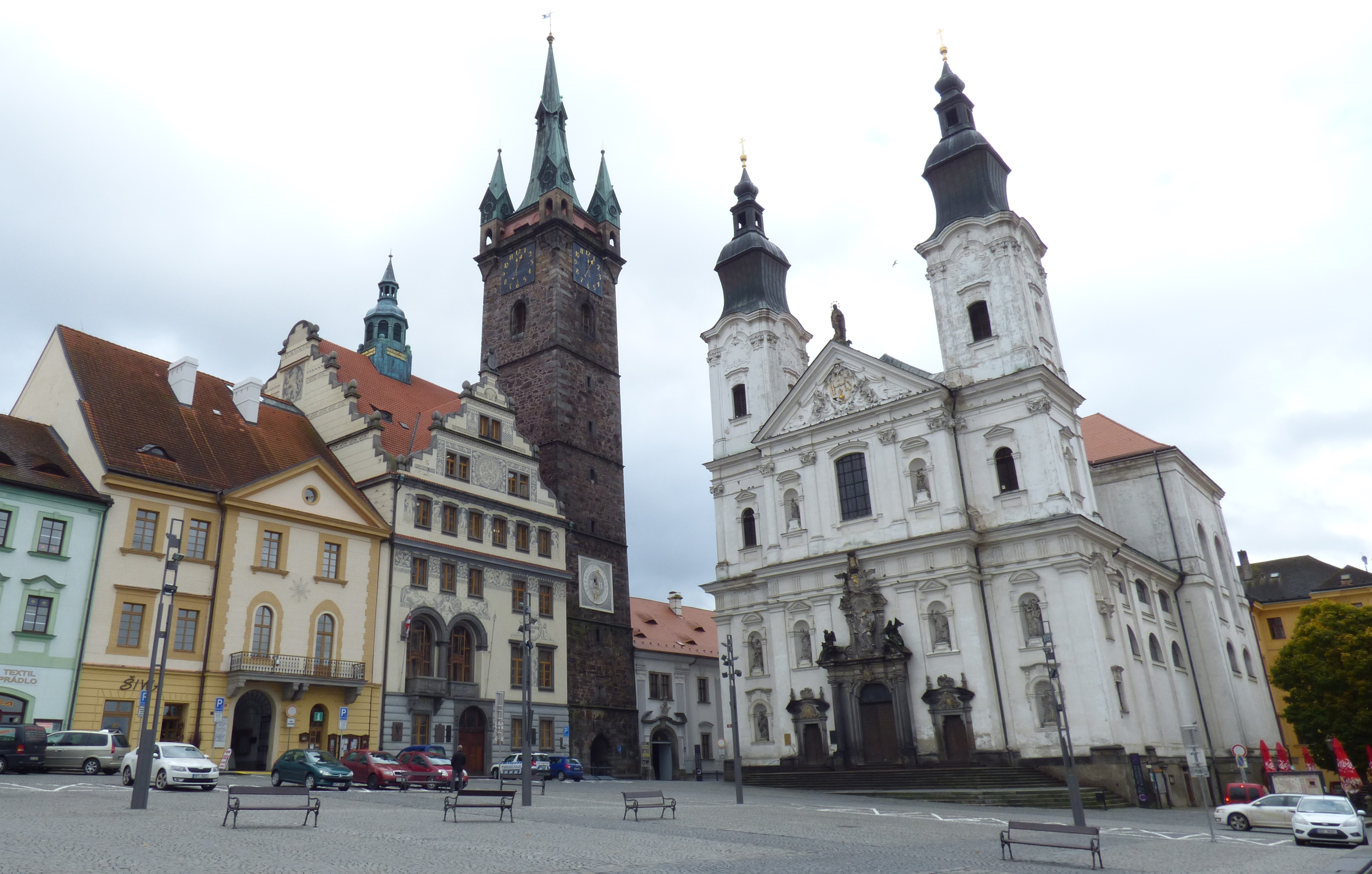 Klatovy